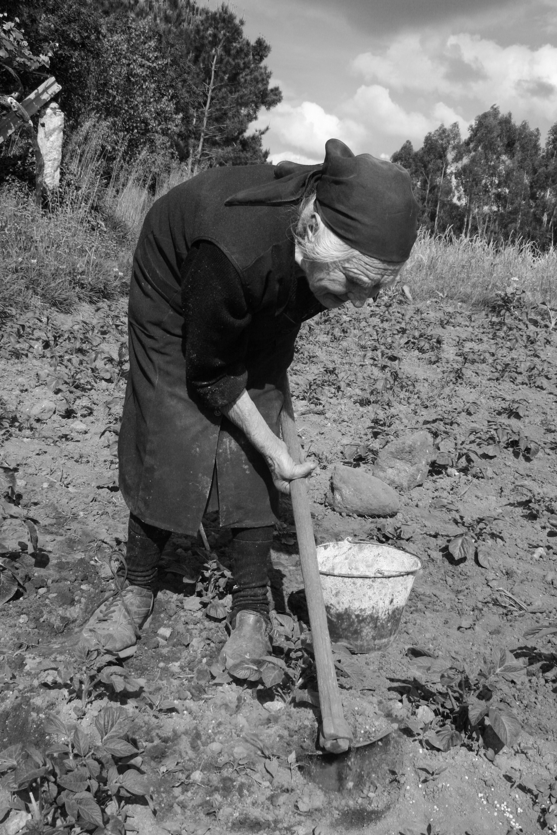 Elvina, sacha que sacha